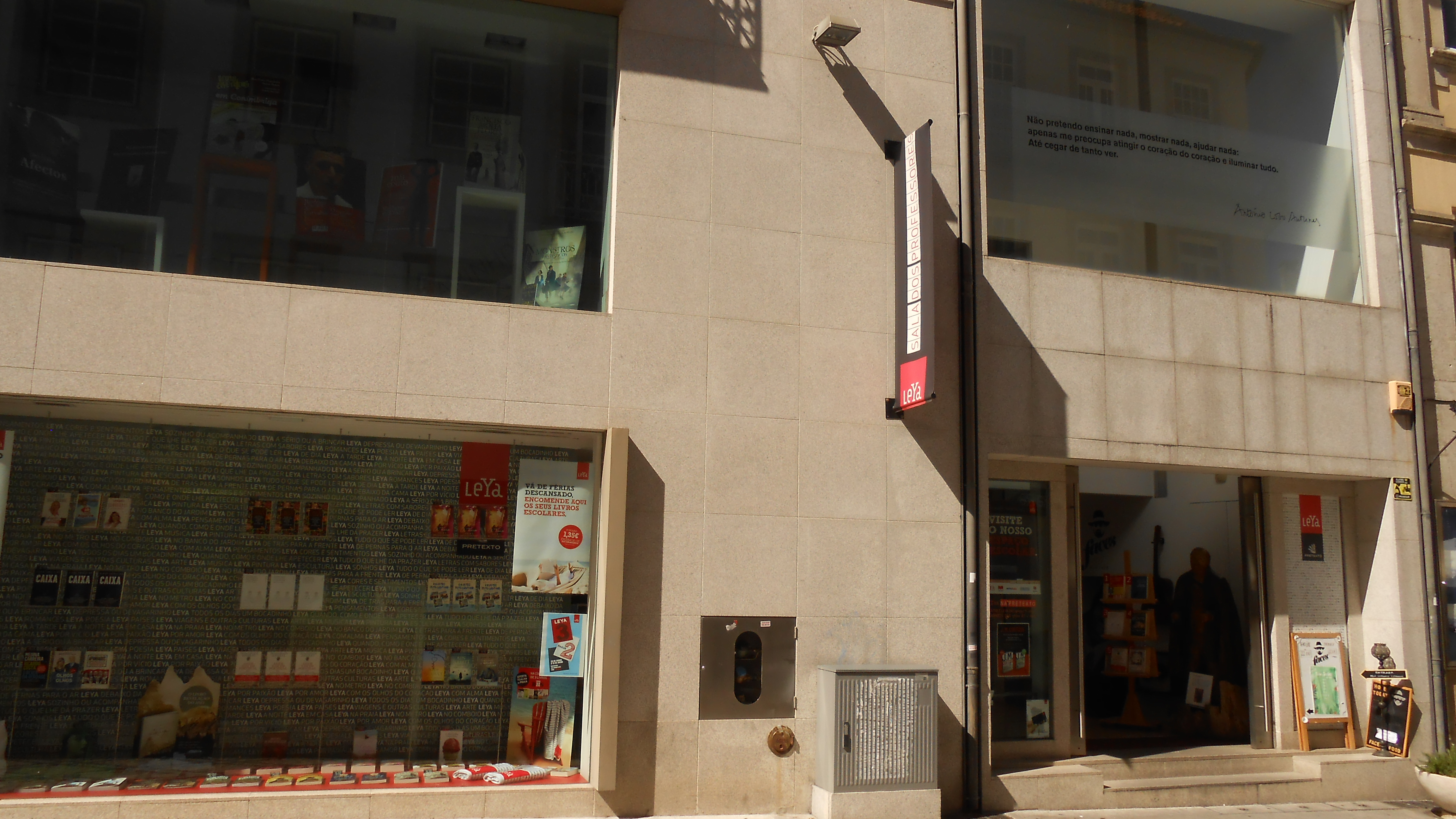 Livraria da editora LeYa em Viseu.